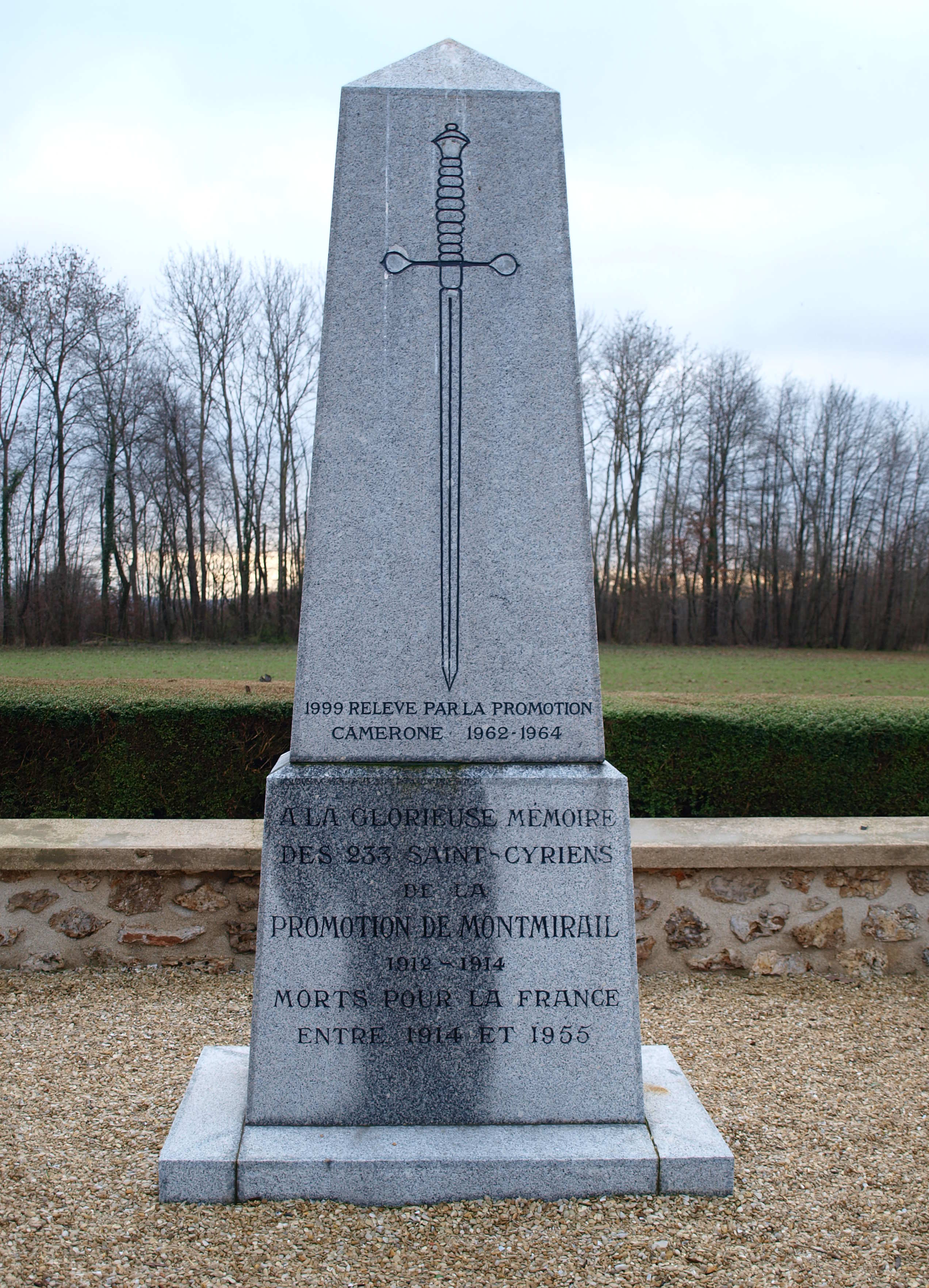 Mémorial saint-cyrien à Marchais-en-Brie (Aisne, France), sur la RD, face au mémorial du 11 février 1814.